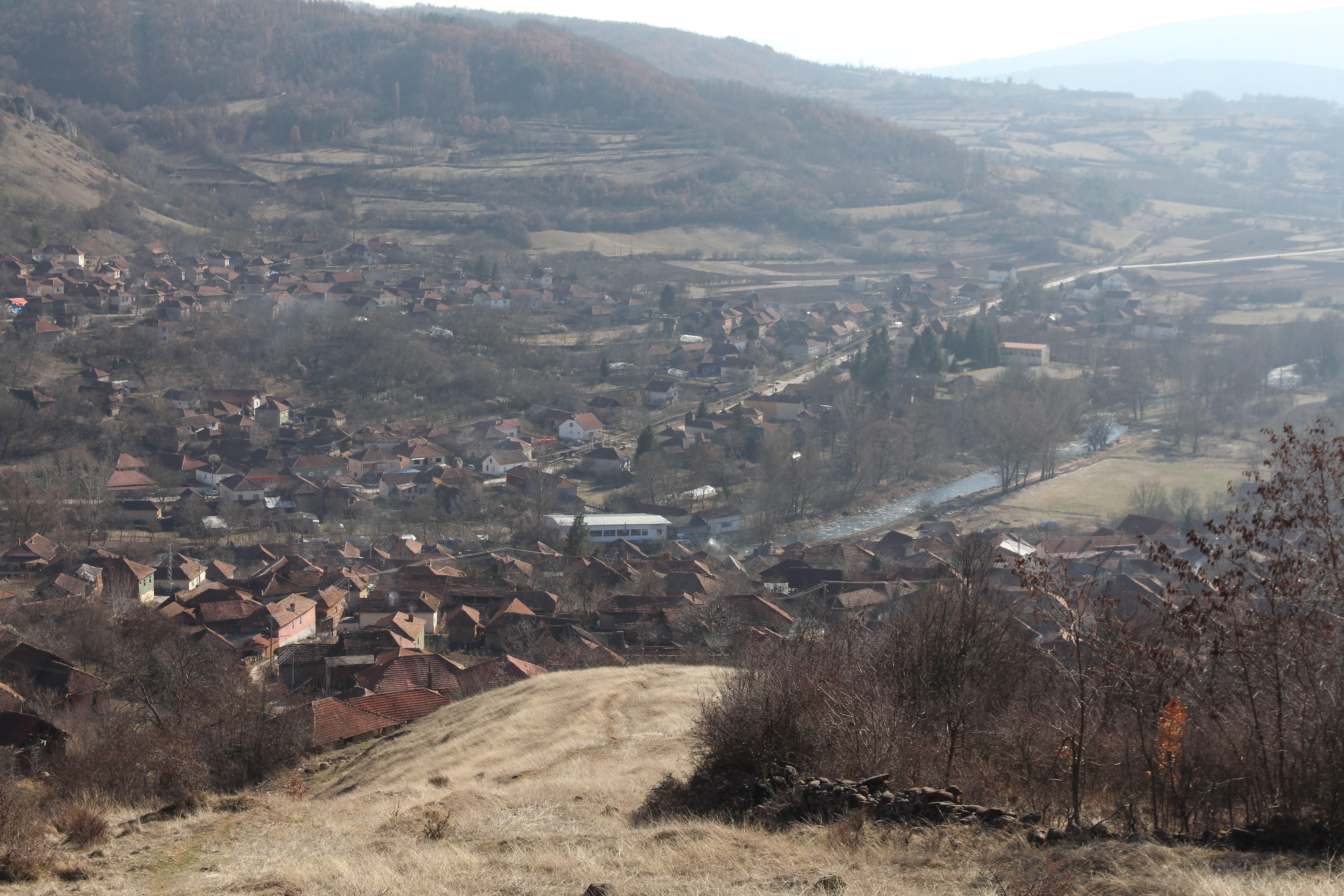 Srpski (latinica): Priroda Stare planine, Srbija